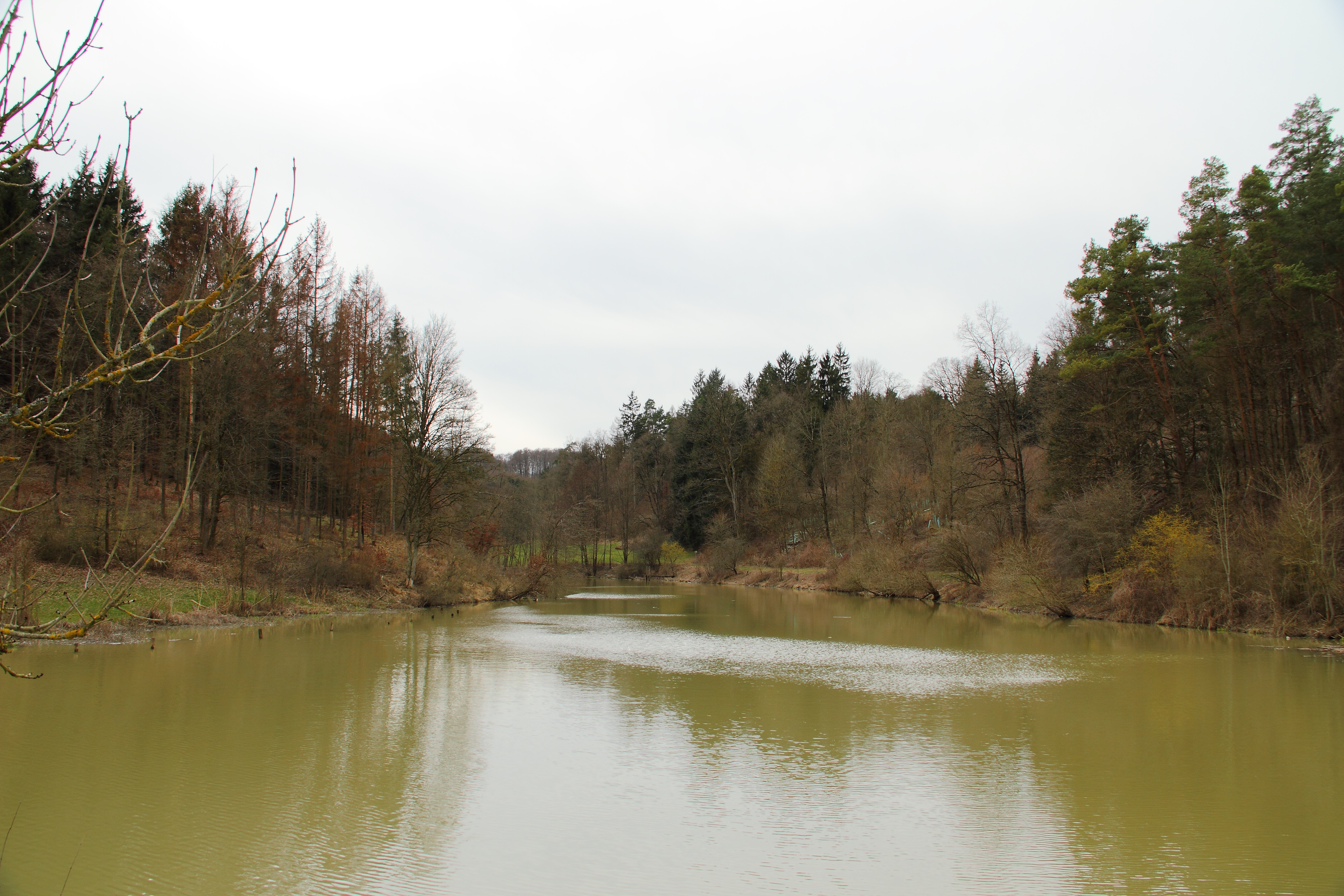 Der Aschbachsee ist ein Stausee im Lauf des Aschbaches, der sich auf der Gemarkungsgrenze zwischen den Dörfern Adolzhausen, Herrenzimmern und Schönbühl befindet. Er ist bei Anglern und im Sommer als Badesee beliebt. Blick südwest- und aufwärts in die Einlaufbucht des Aschbaches hinein.